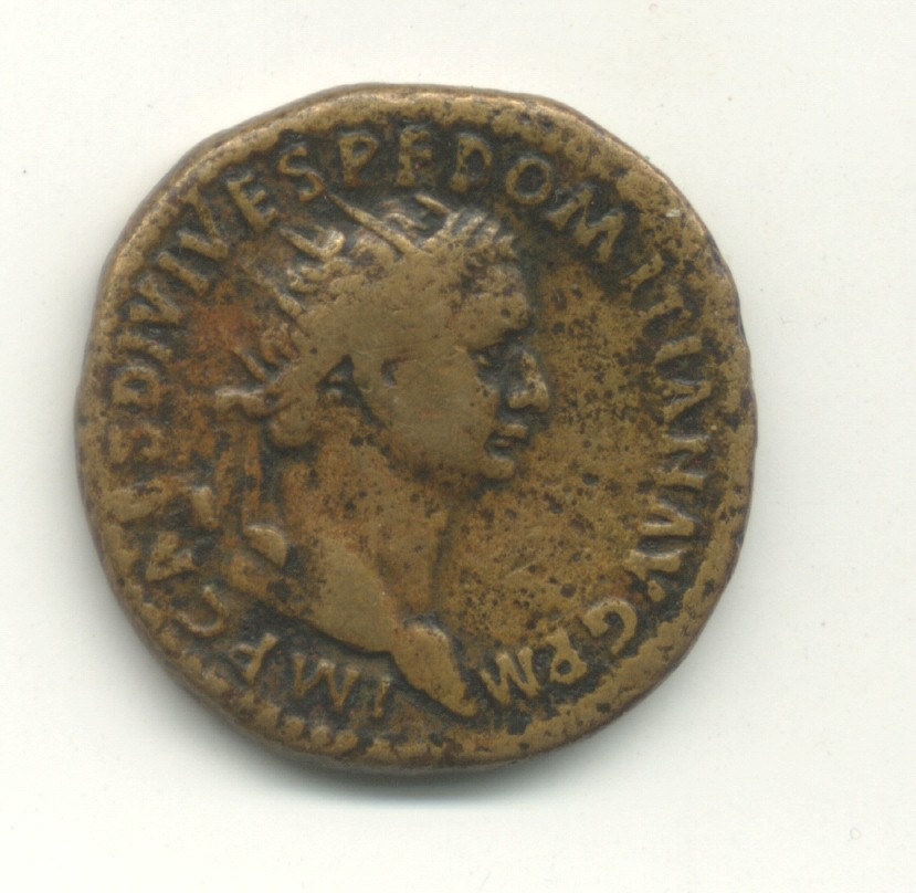 Dupondio di Domiziano (foto Carlomorino) Dupondio di Domiziano del 81 d.C. D/ Testa radiata di Domiziano dx - IMP CAES DIVI VESP F DOMITIAN AVG P.M. R/ (non raffigurato) Minerva con lancia e scudo - S C - TR P COS VIII DES VIII PP